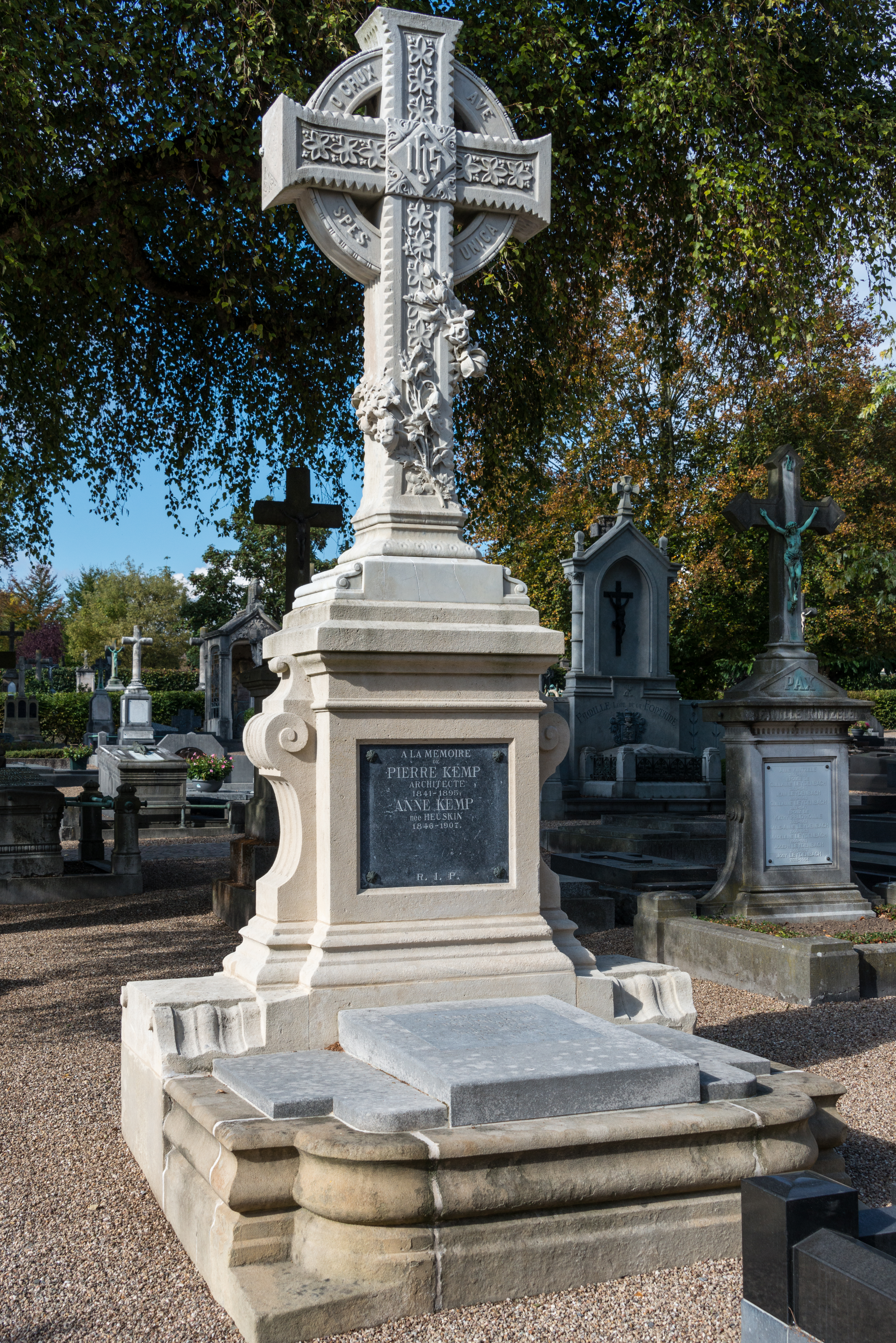 D'Graf vum Pierre an Alphonse Kemp um Nikloskierfecht.